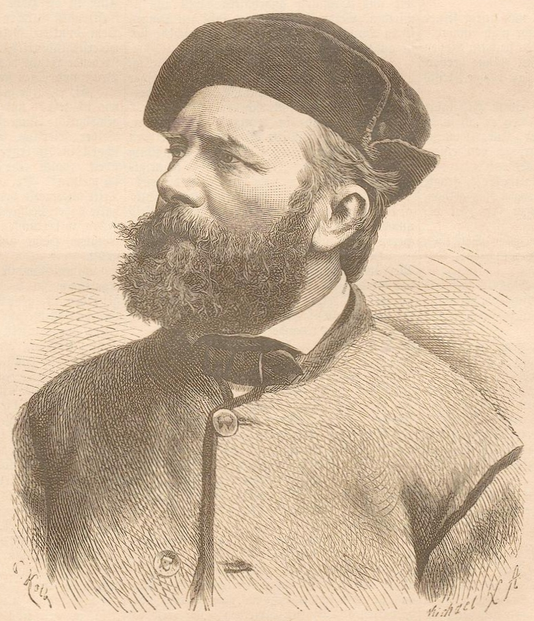 Albert Wolff. In: Illustriertes Unterhaltungs-Blatt: wöchentliche Beilage zum Darmstädter Tagblatt. Darmstadt, 1886